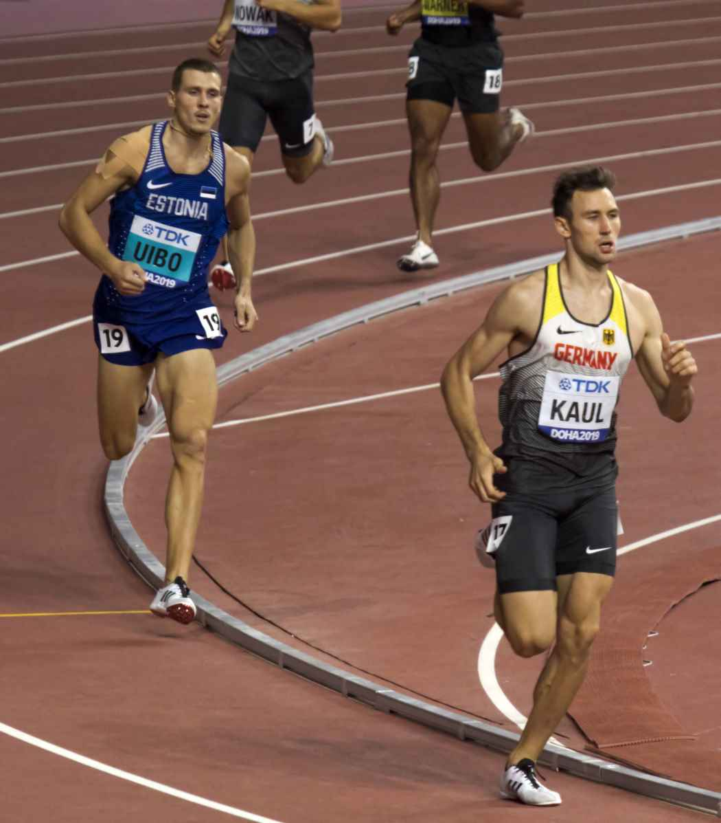 DOH70189 decathlon 1500m kaul uibo